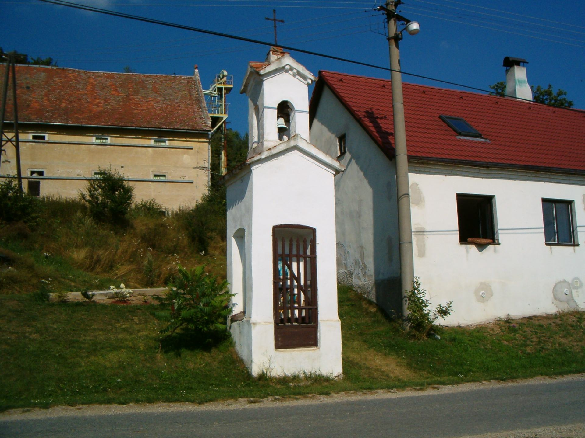 Kapličko v Novém Hobzí